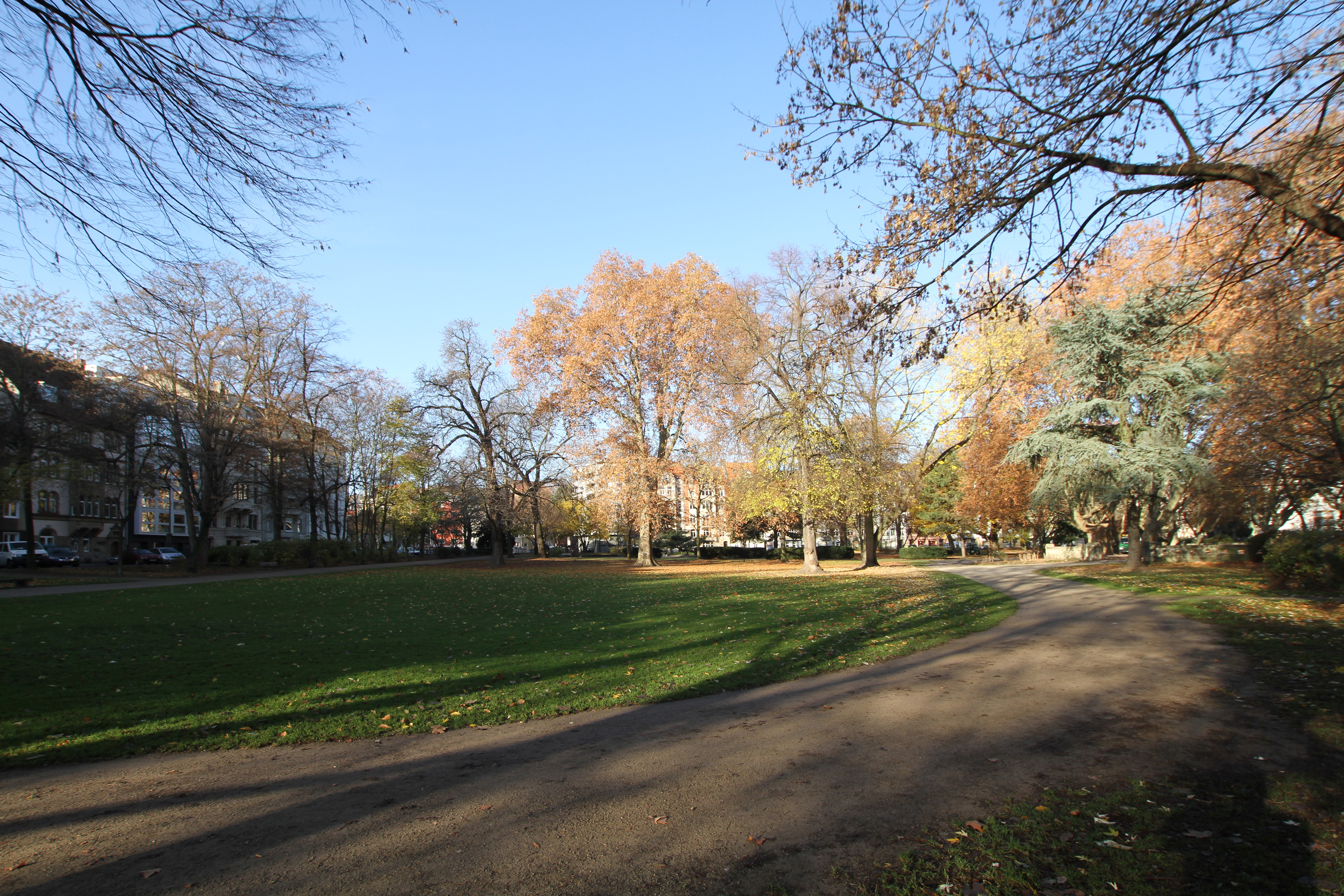 Köln-Neustadt-Süd, Grünanlage Römerpark This is a photograph of an architectural monument.